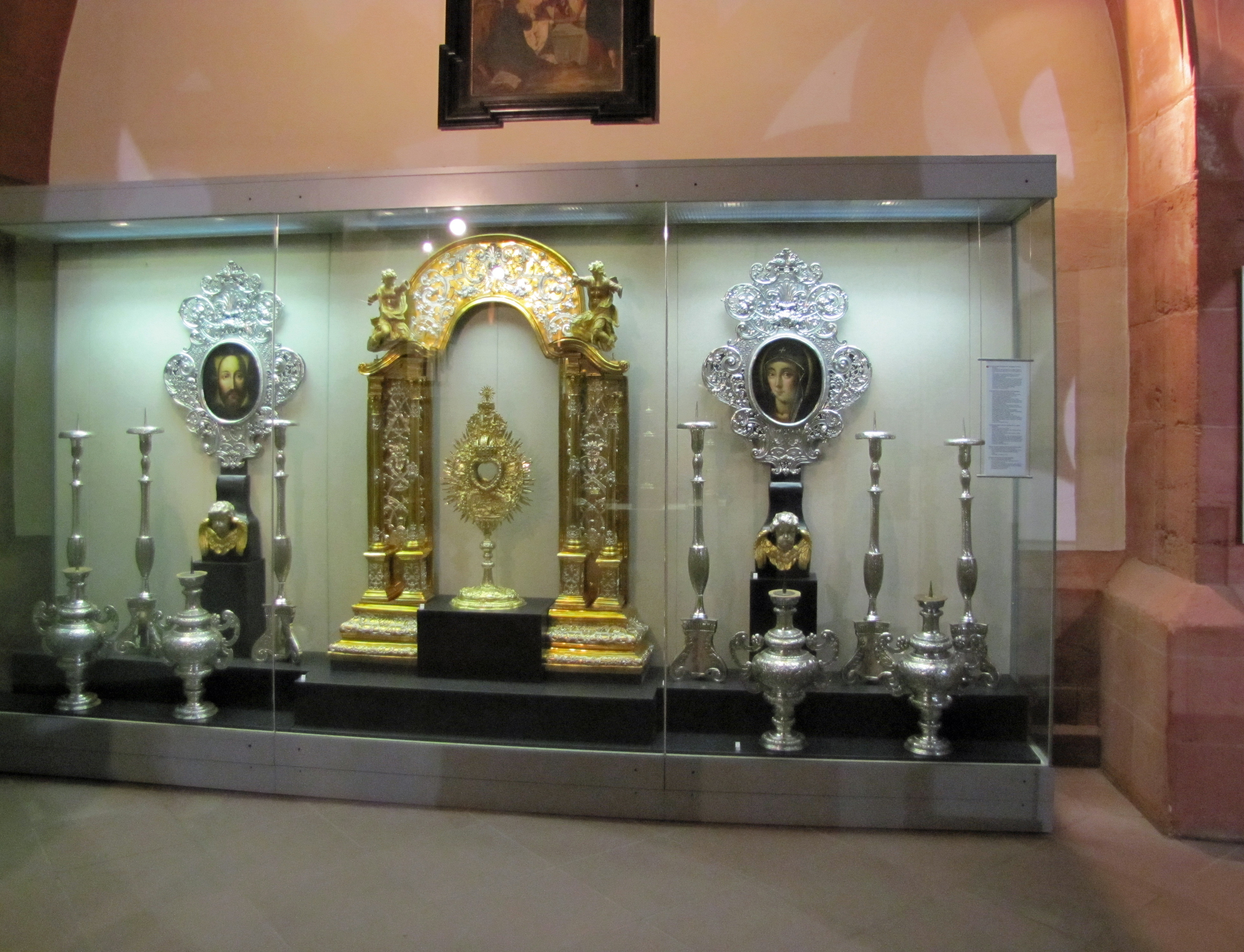 Dom-Museum. Teile des Domschatzes.